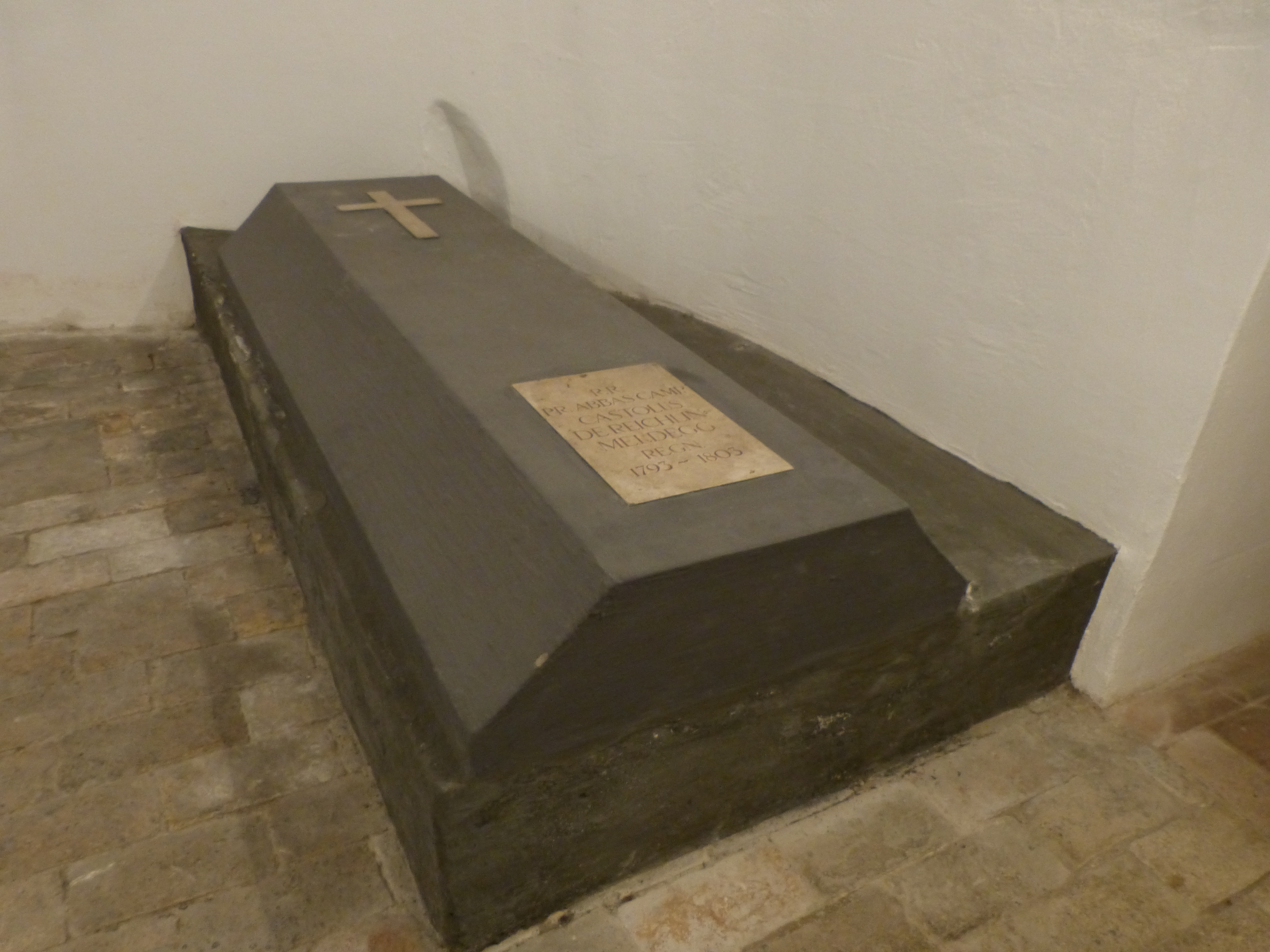 Grablege des Castolus (Kastolus) Reichlin von Meldegg, auch Reichlin von Meldegg-Amtzell (* 26. September 1743 in Unterthingau; † 28. Mai 1804 in Kempten) in St. Lorenz Basilika, Kempten